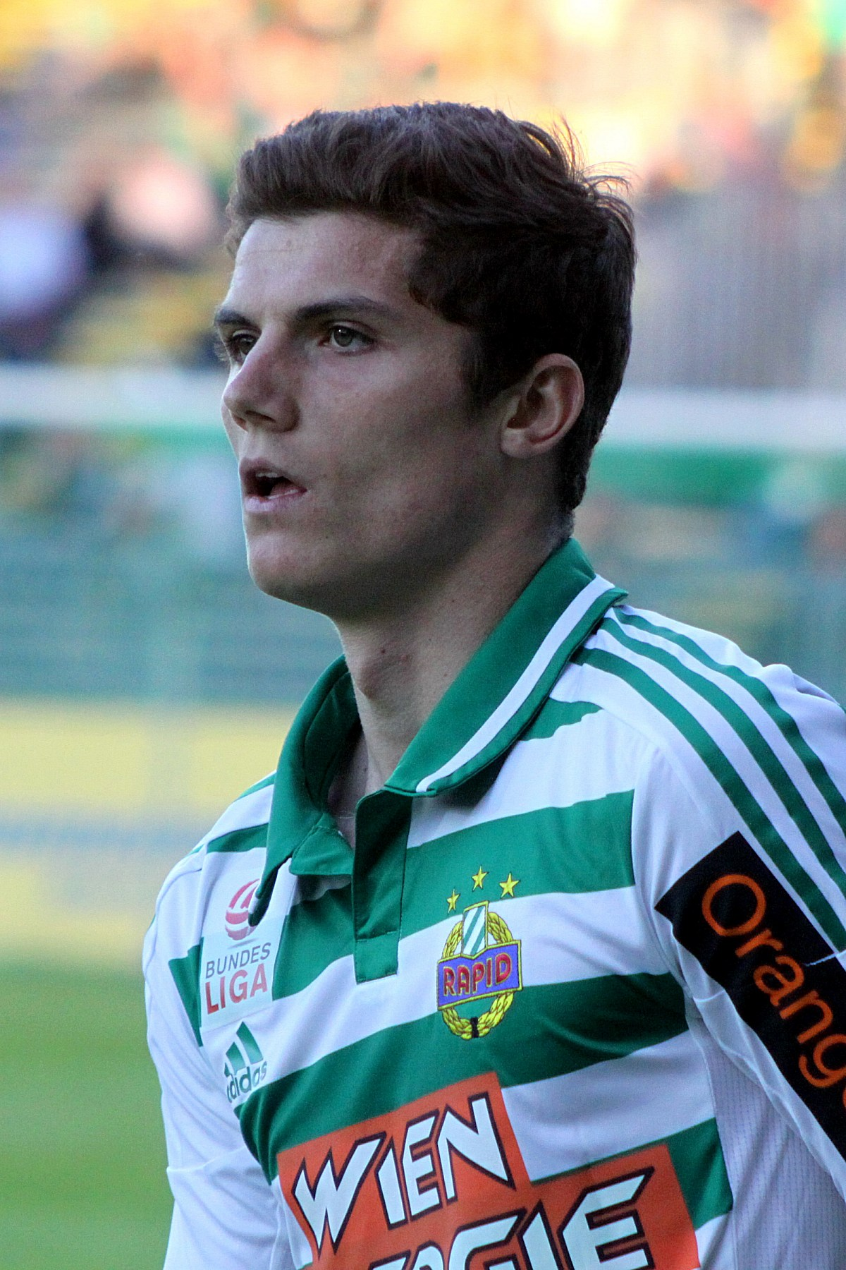 Meisterschaftsspiel der österreichischen Bundesliga: SV Mattersburg gegen SK Rapid Wien am 18. Mail 2013 (2:0)] im Mattersburger Pappelstadion.] - Das Foto zeigt Marcel Sabitzer (SK Rapid Wien).